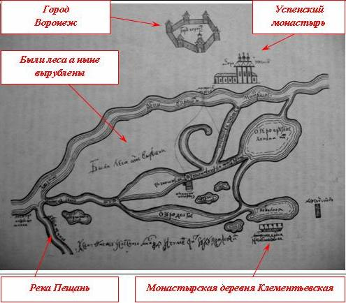 Чертеж Воронежа 1694 года